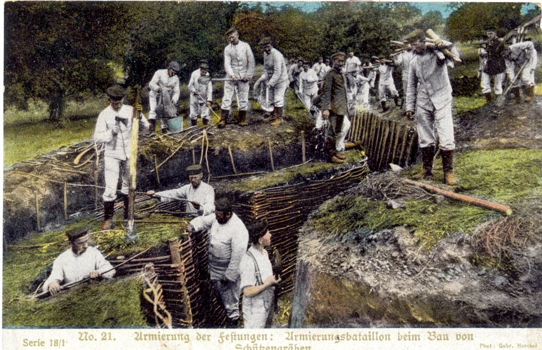 Armierung der Festungen: Armierungsbataillon beim Bau von Schützengräben. Alte Postkarte Ausgabe des Kriegsfürsorgeamtes Wien IX. Zum Gloria-Vivtoria Album, Sammel- und Nachschlagewerk des Völkerkrieges, Serie 10/1, Nr. 21